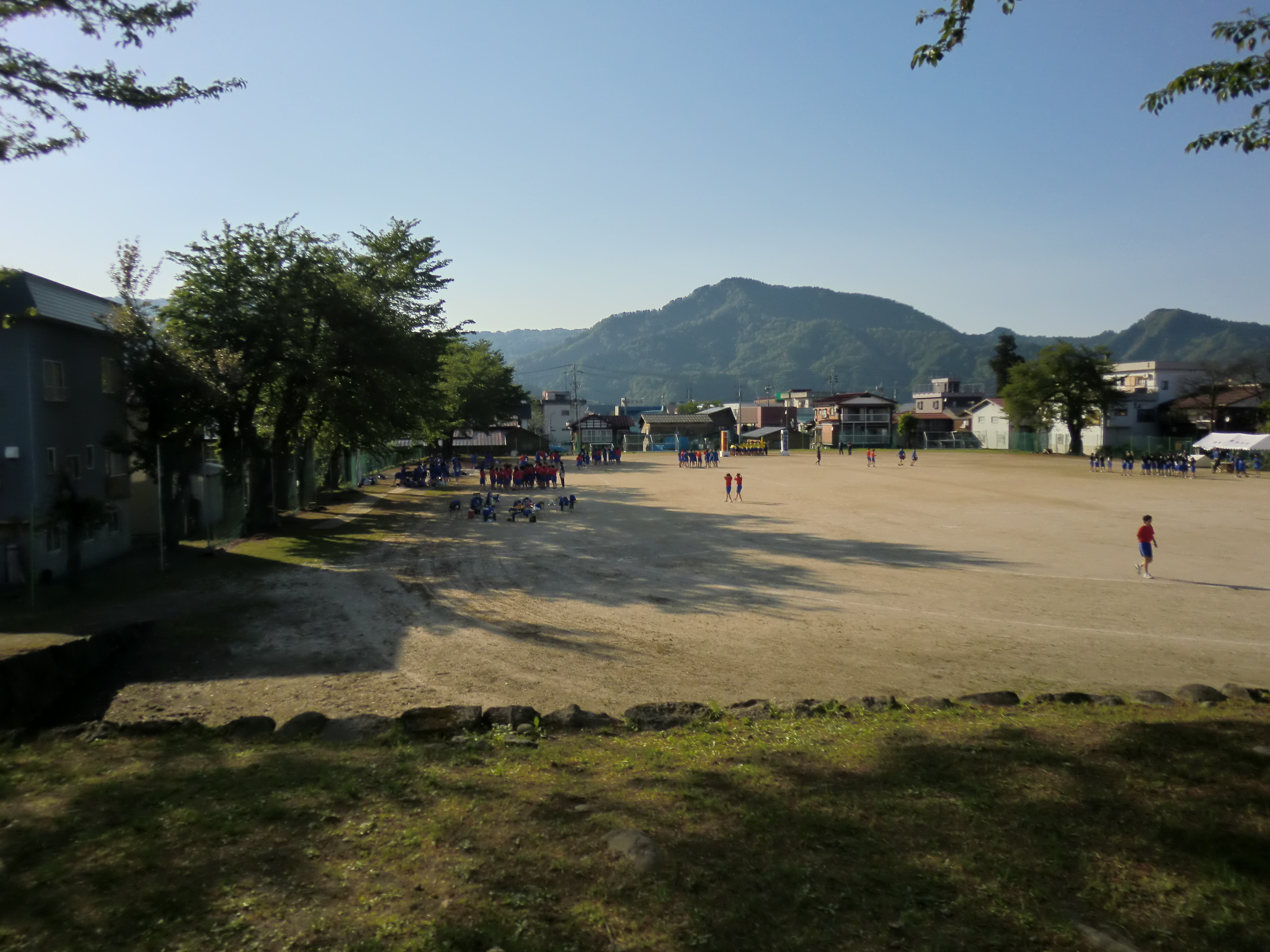 津南中等教育学校グラウンド